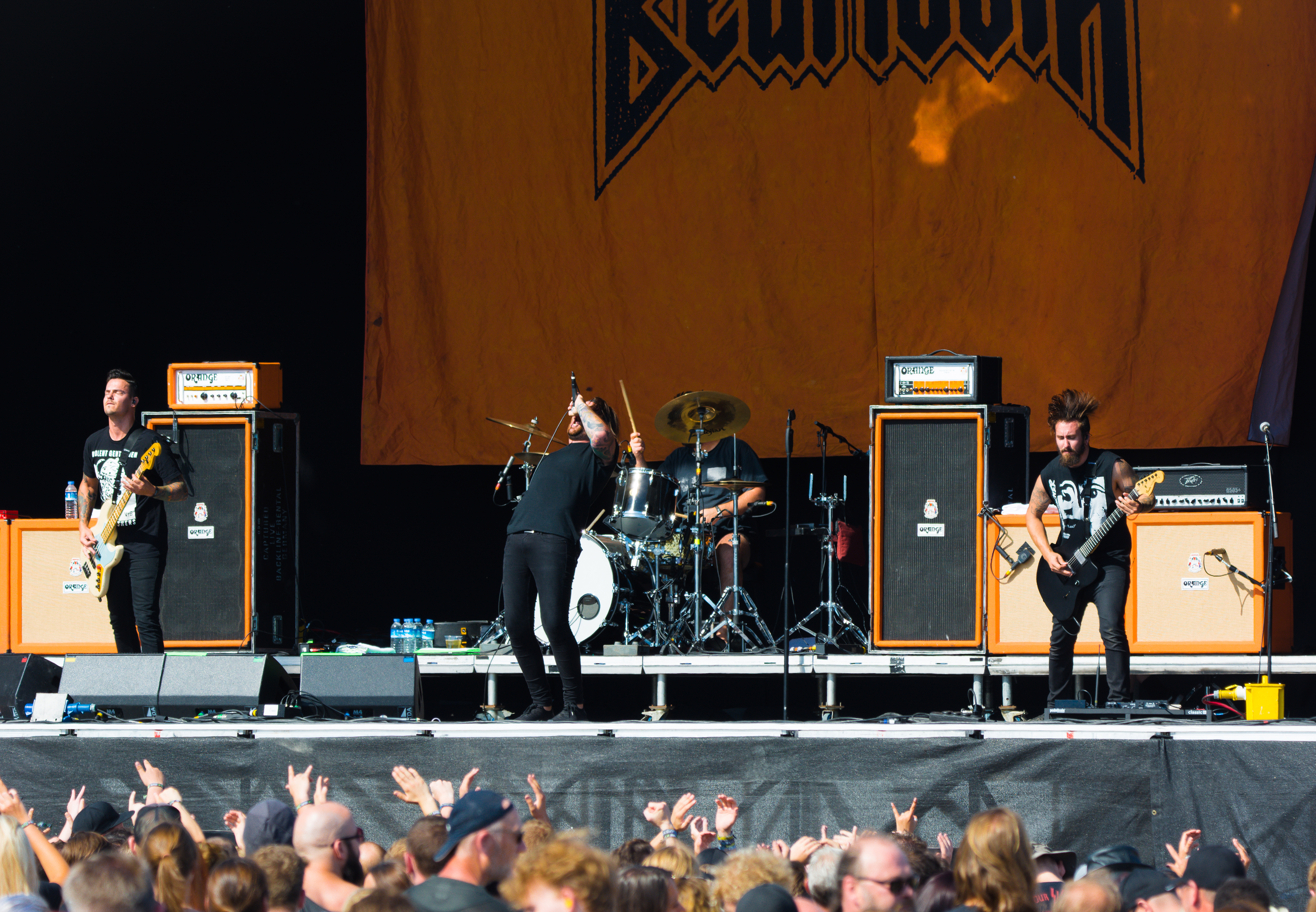 Beartooth beim Elbriot 2018 beim Elbriot 2018